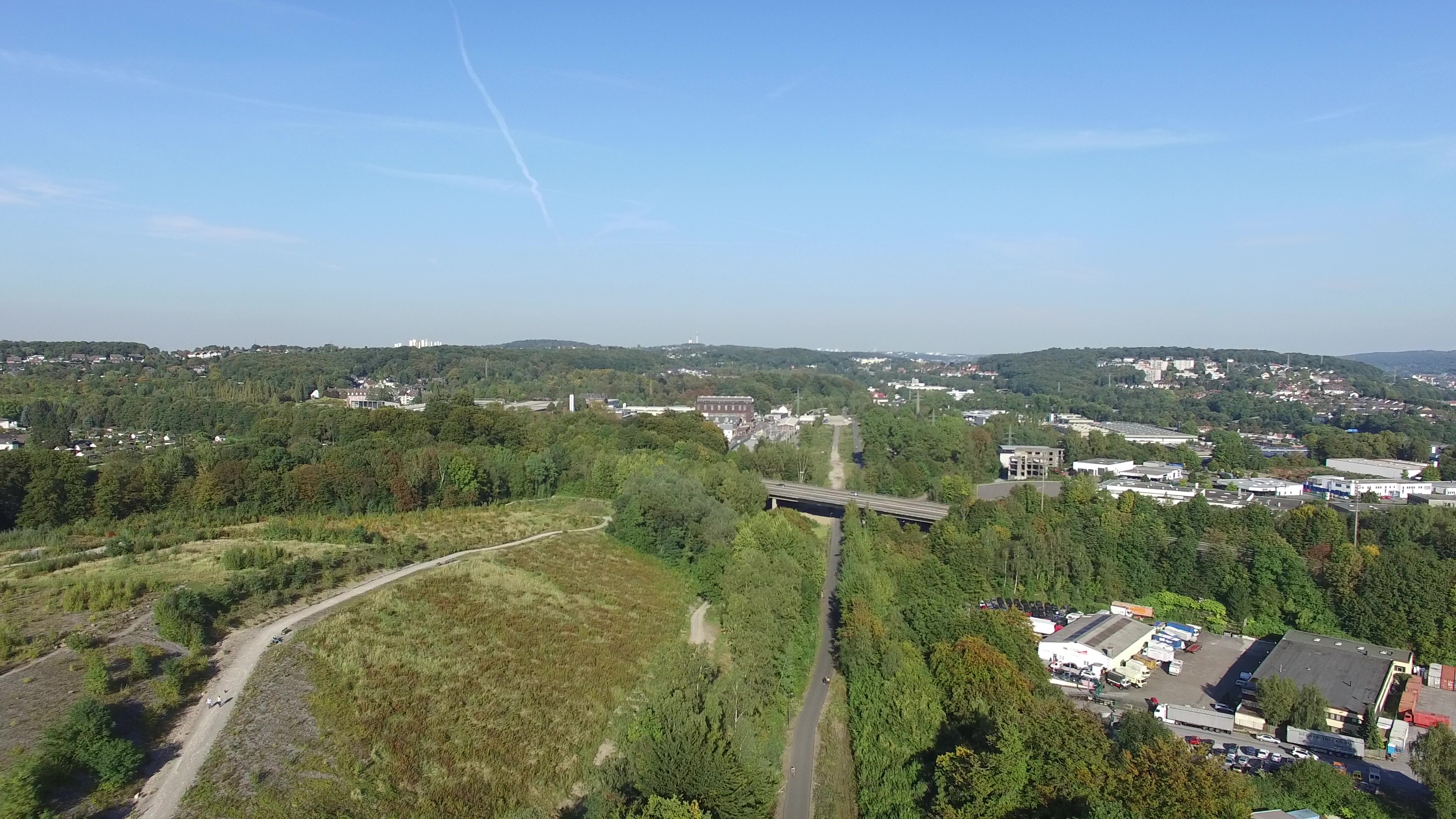 Nordbahntrasse bei Wuppertal-Lüntenbeck; Bundesautobahn 535; links ehem. Deponie Lüntenbeck